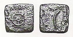 A coin of Menander I (r.160-135 BC) with a dharmacakra and a palm.